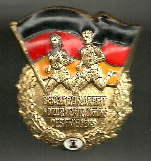 Sportabzeichen der DDR alte Form